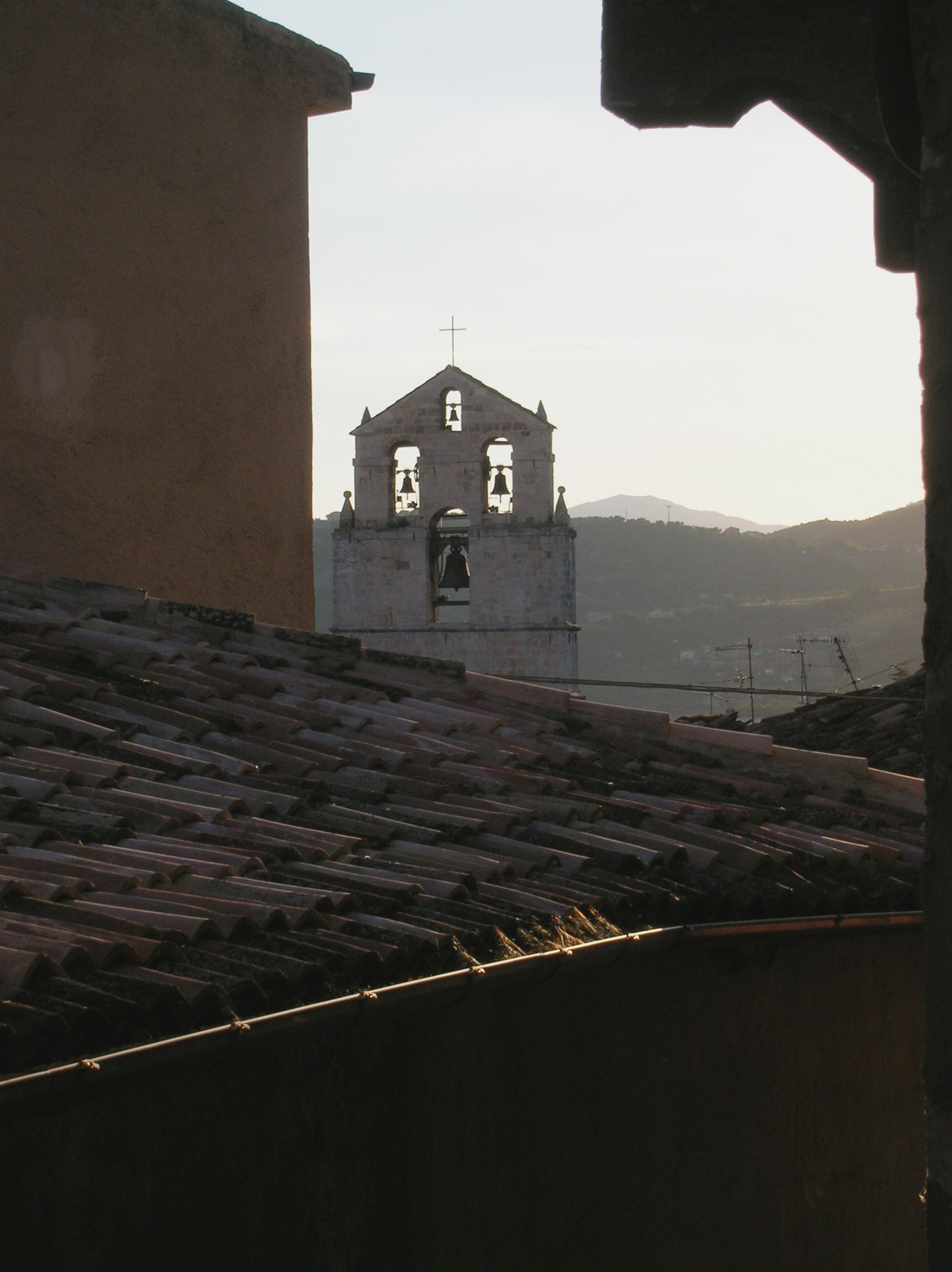 Paganica tetti